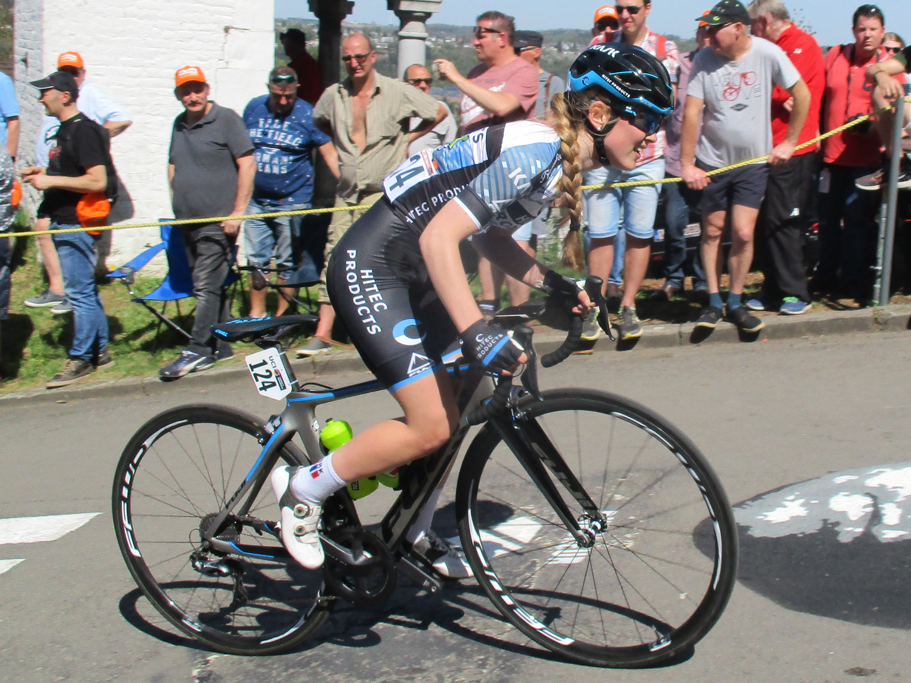 1e passage van de Waalse Pijl 2018 op de Mur van Huy.